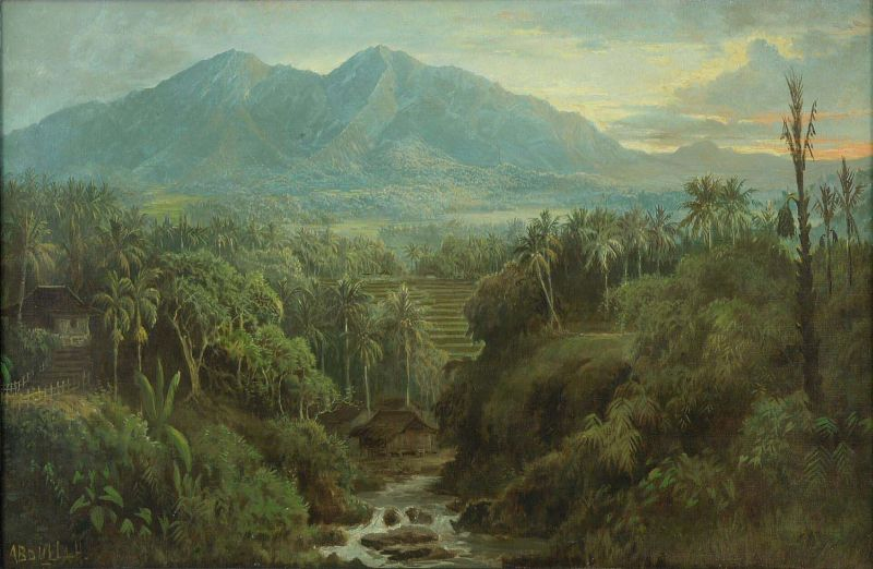 Olieverfschilderij. Een berg in de Preanger